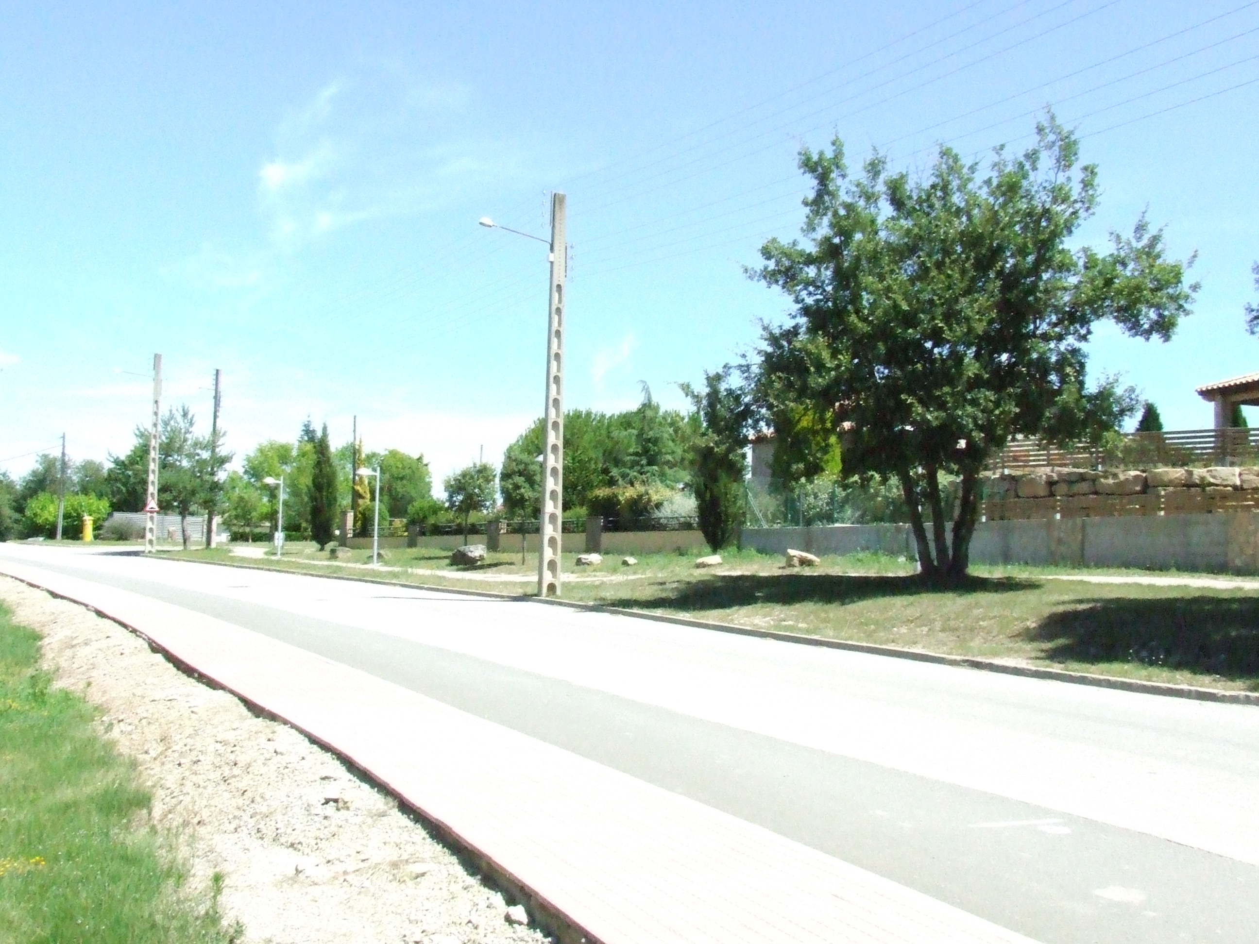 Urbanització del Prat (Castellcir, Moianès)